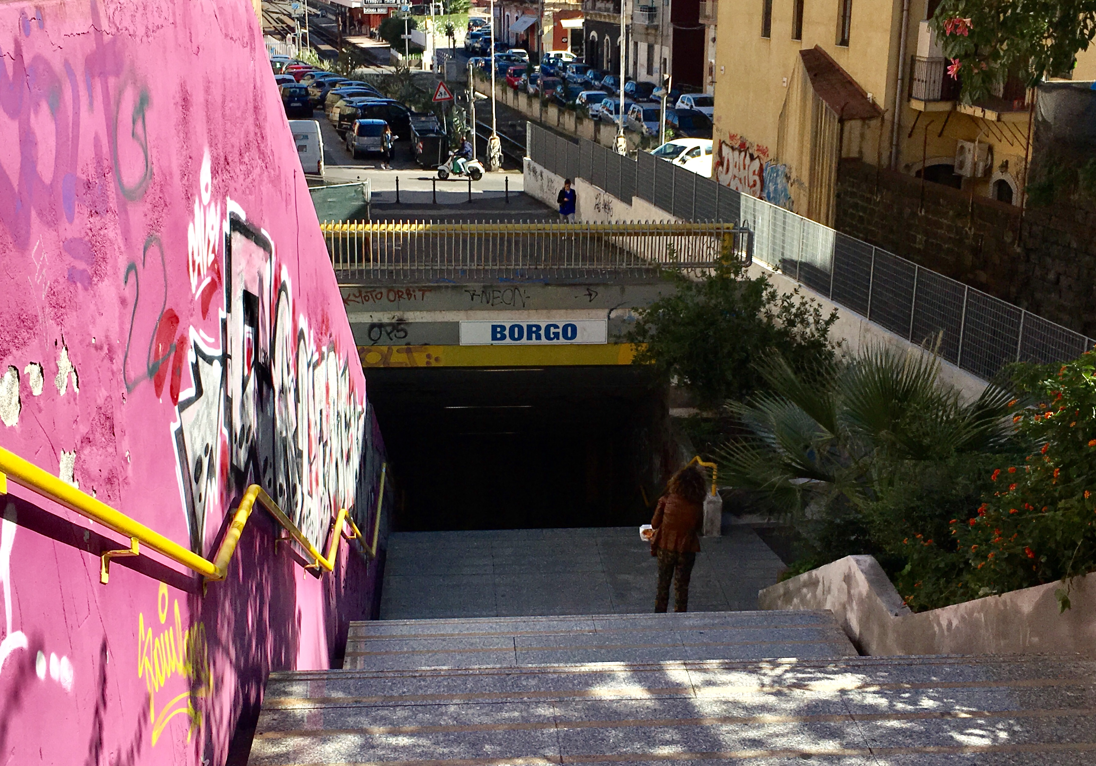 Entrata della stazione metropolitana Borgo in via Etnea.